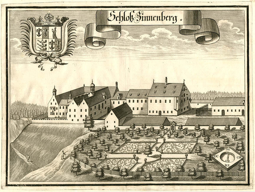 “Schloß Zinnenberg.” aus : Beschreibung des Churfürsten- u. Hertzogthumbs Ober- und Nidern Bayrn. – Rentamt München, 1701